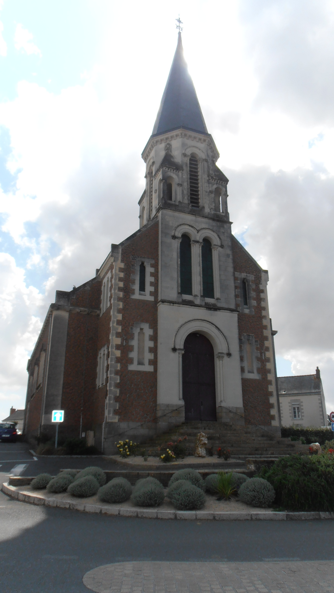 L'église du village